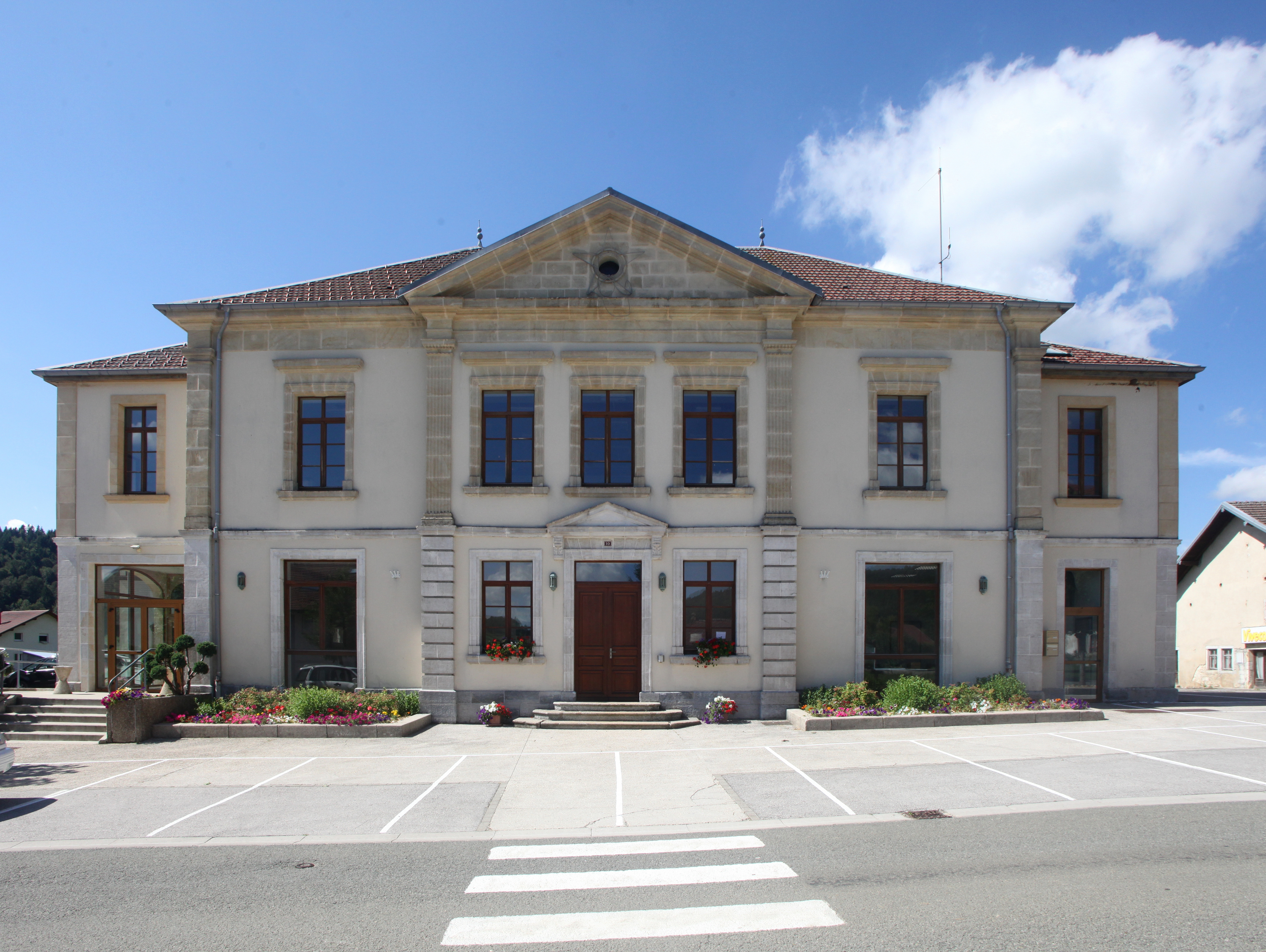 Mairie de La Chaux (Doubs).